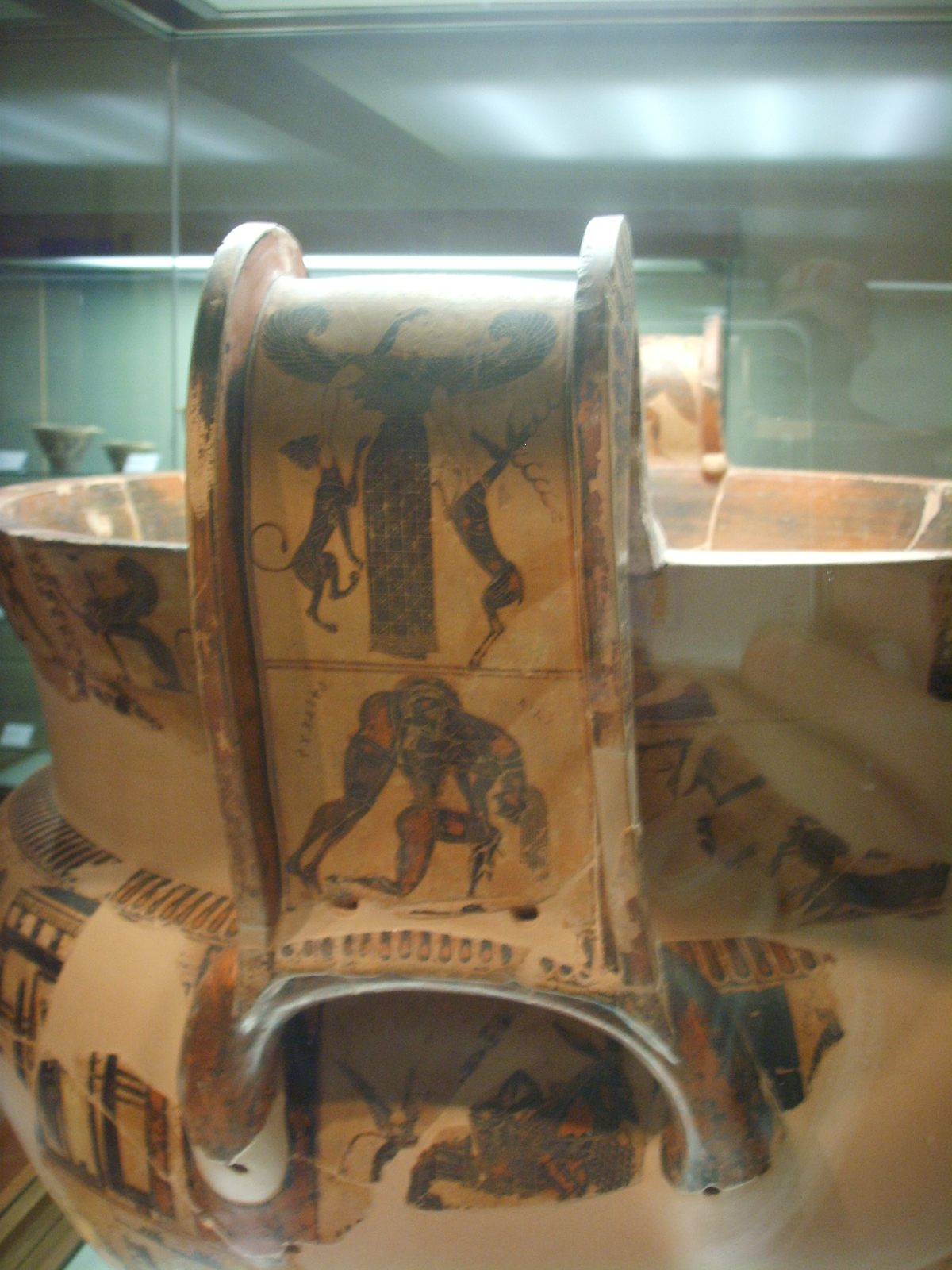 Athenian volute-krater.